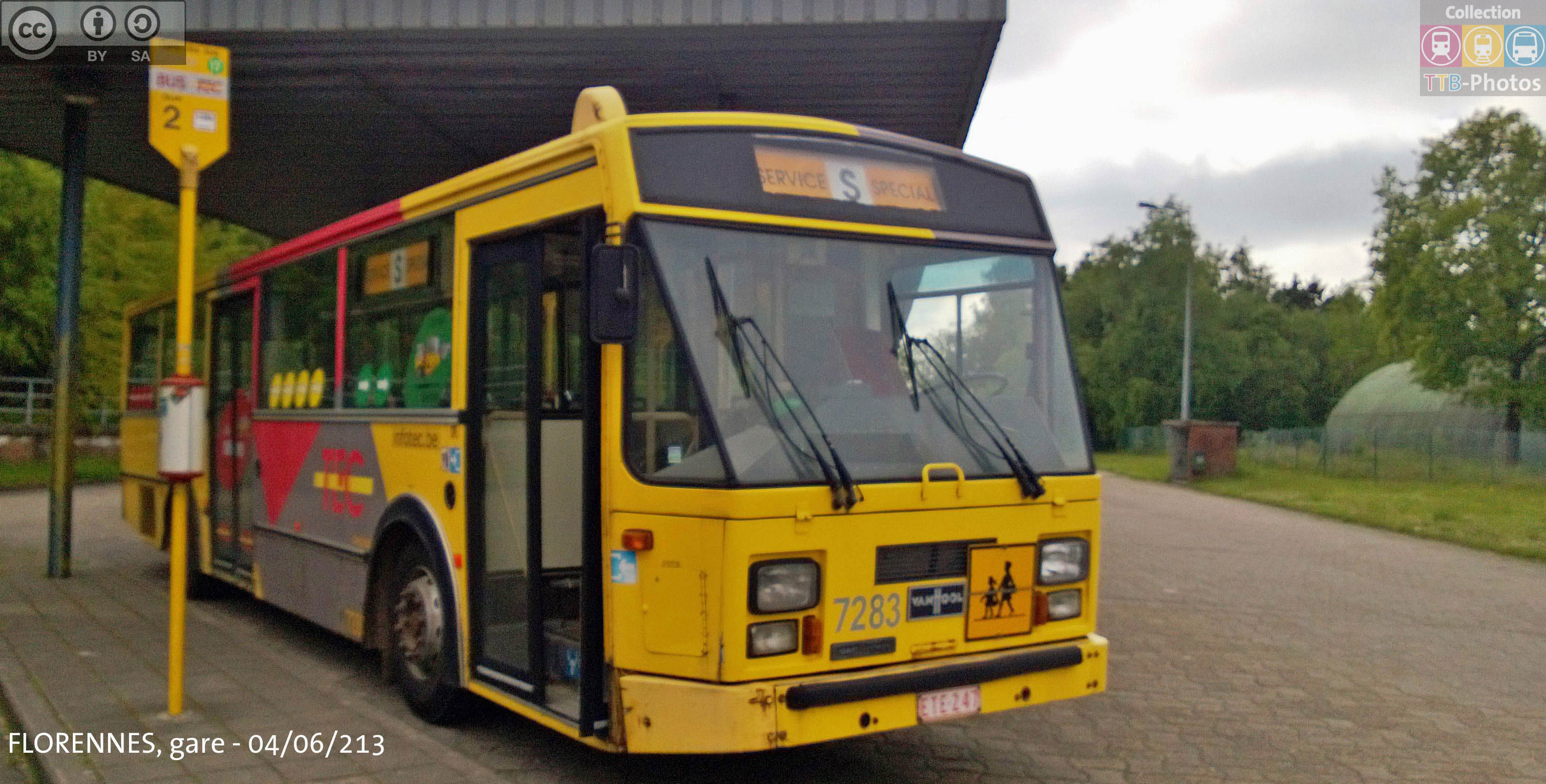 TEC Charleroi 7283 - Film spécial Florennes, gare des autobus - 4 juin 2013 Van Hool A120/31 intercity Daf LT160 ex-SNCV 2283(07/03/1989)